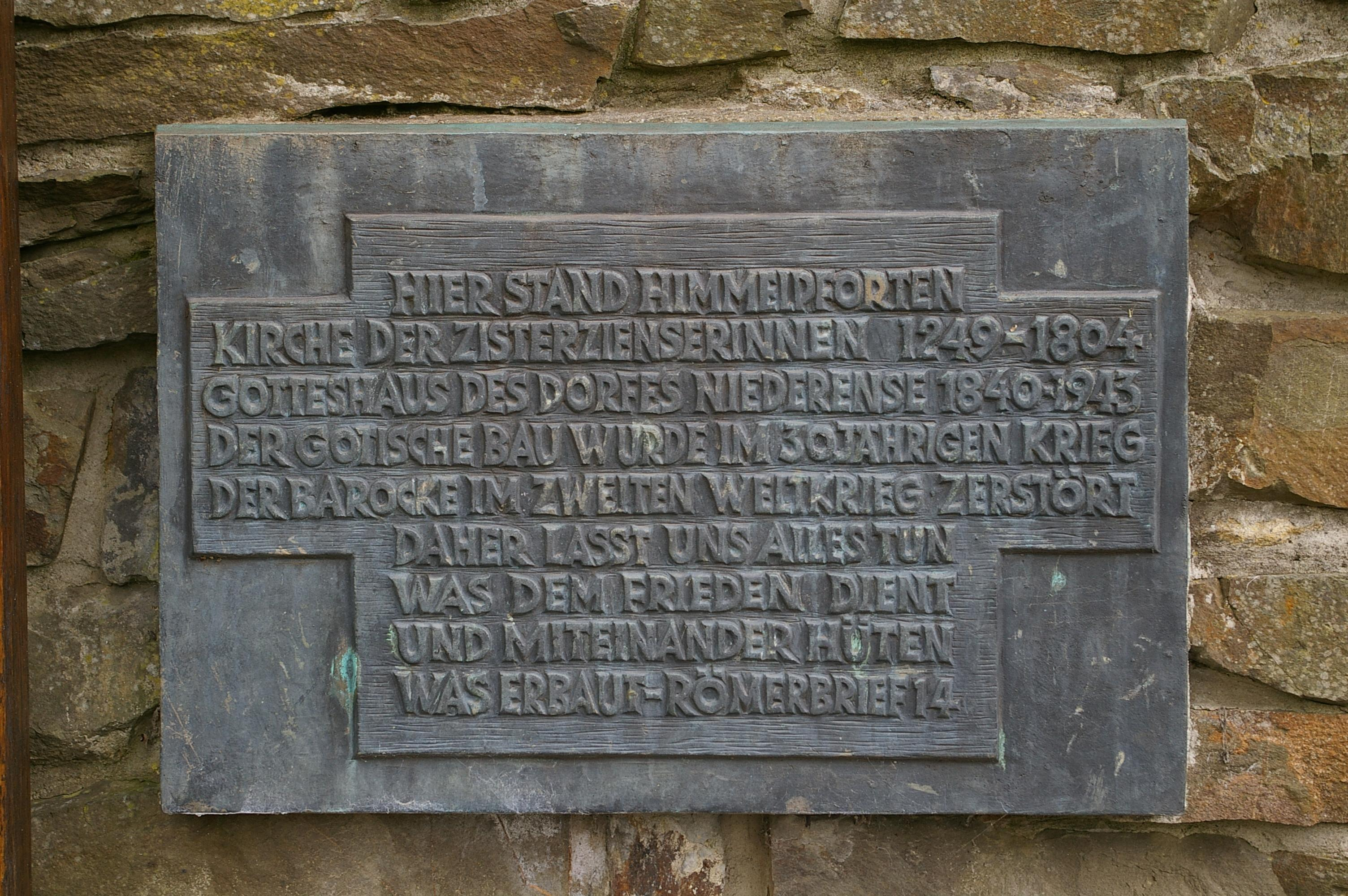 Gedenkstätte am ehemaligen Kloster Himmelpforten, das am 17. Mai 1943 durch die Flutwelle der bombardierten Möhnetalsperre zerstört wurde. Gedenktafel an der Wand mit Altarraum.